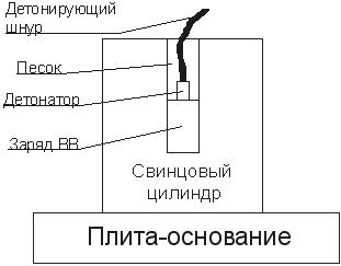 Схема испытания взрывчатых веществ для определения фугасности по методу Трауцля